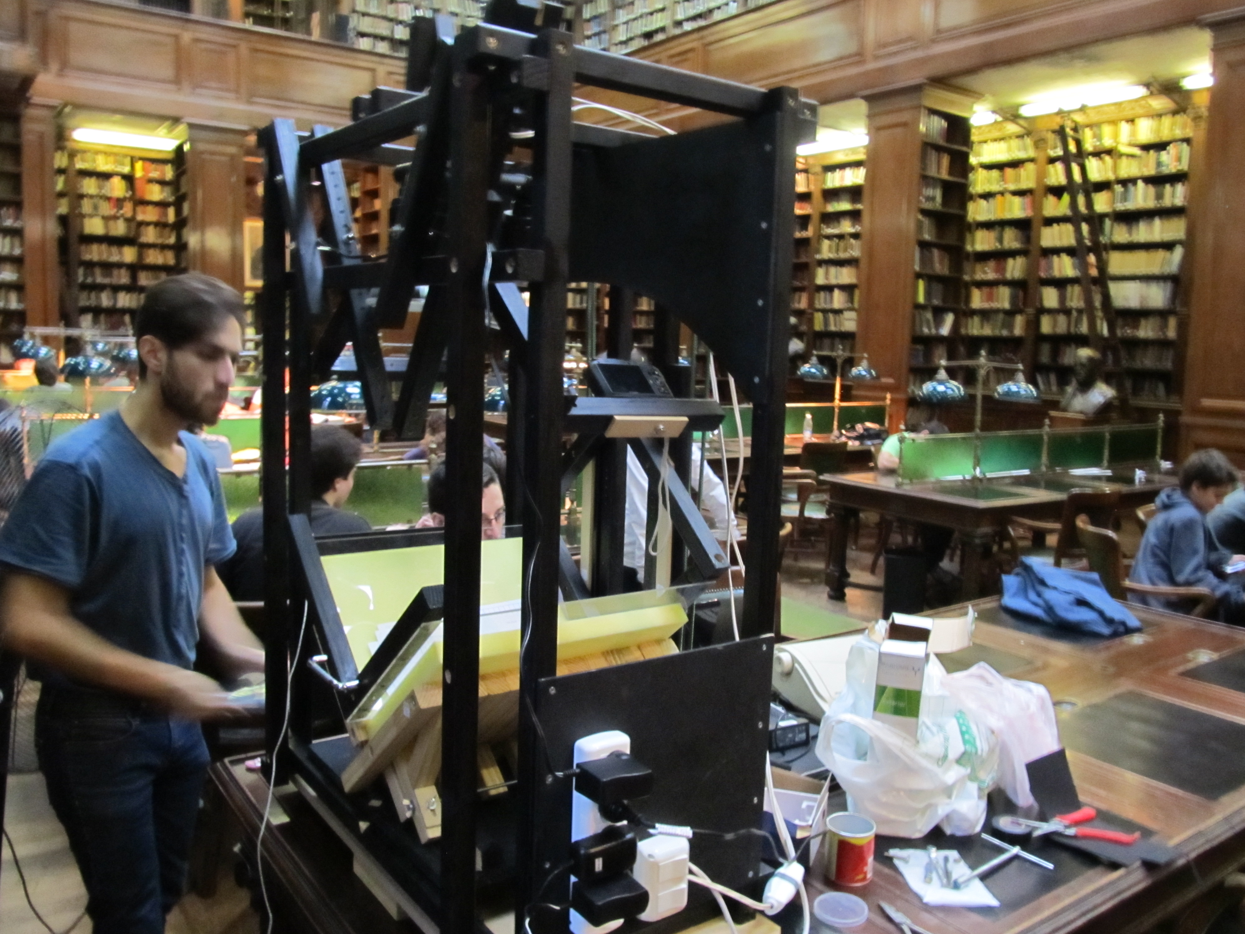 Escaner de libros en la Biblioteca del Colegio Nacional de Buenos Aires